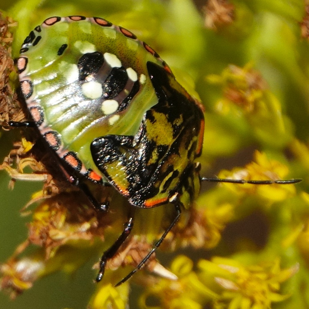 ミナミアオカメムシの幼虫 日本東海地方